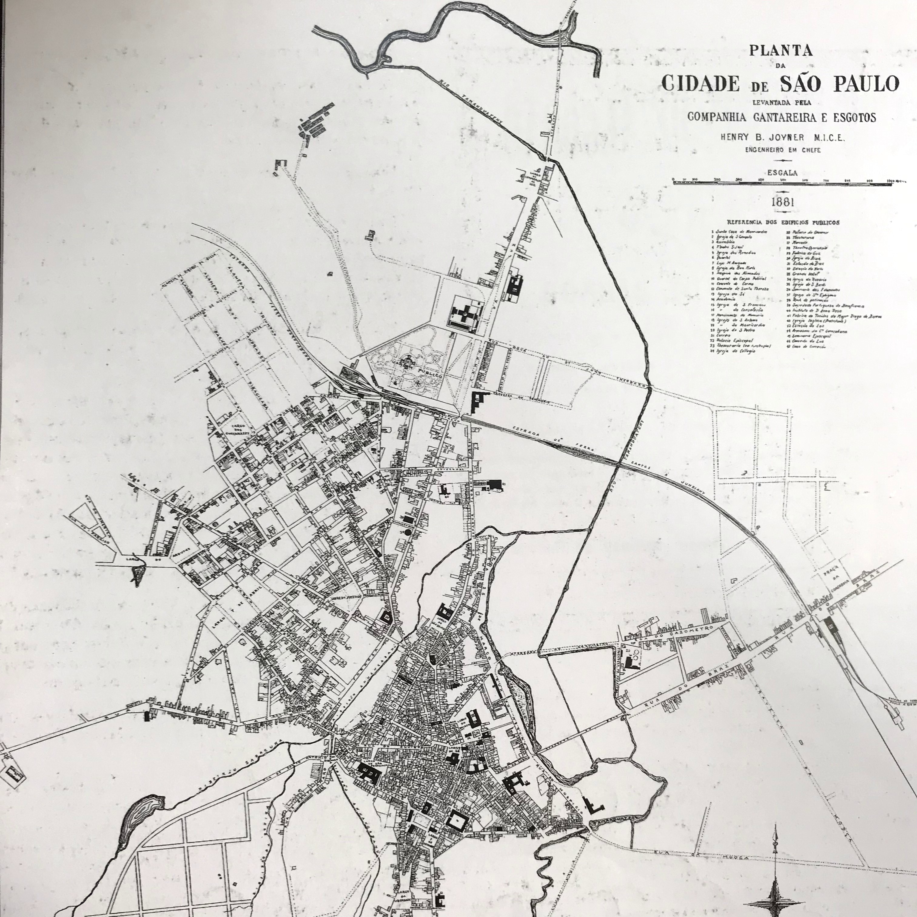 IMAGEM 6